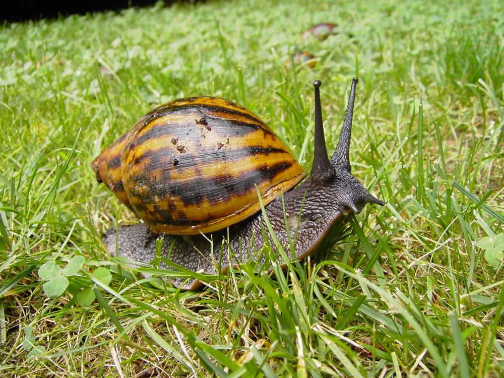 Foto einer Achatina achatina (auch Tigerschnecke genannt).